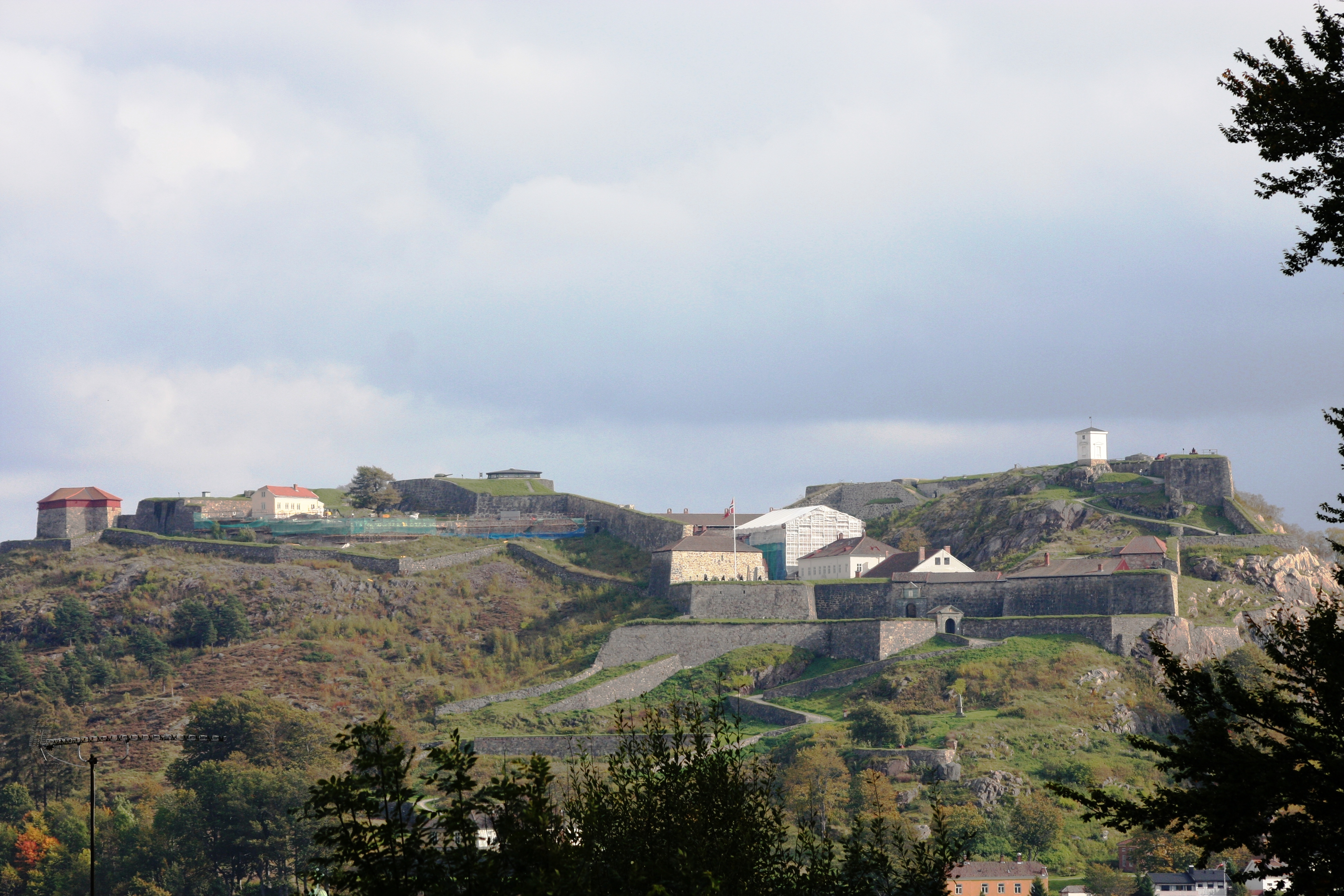 Fredriksted castle / fortress in Halden, southeastern Norway.